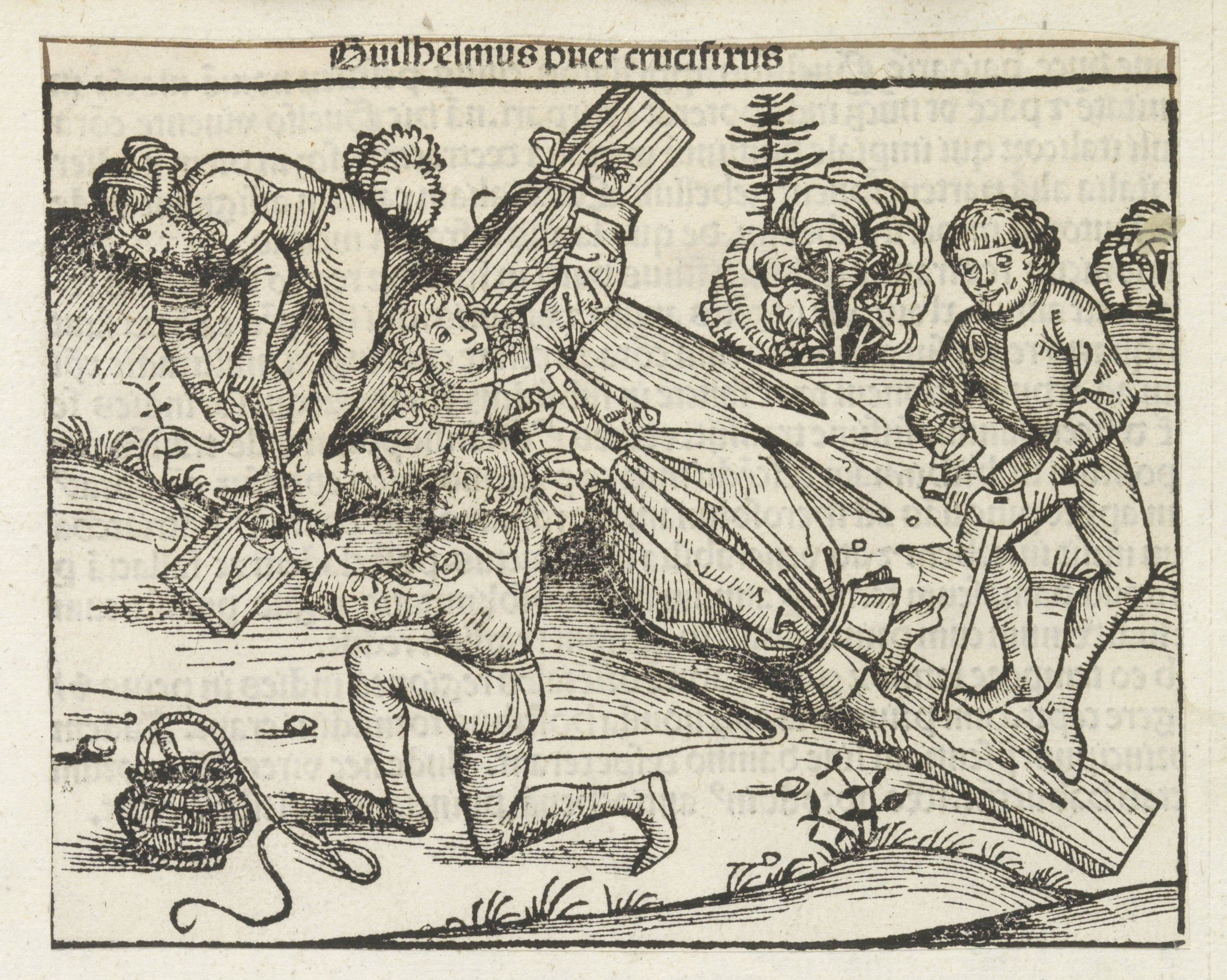 IdentificatieTitel(s): Kruisiging van William van NorwichGuilhelmus puer crucifixus (titel op object)Liber Chronicarum (serietitel)Objecttype: prent boekillustratie albumblad Objectnummer: RP-P-2016-49-40-1Omschrijving: In een landschap wordt een jongen aan een kruis gebonden. De man midden voor slaat een pin door zijn hand. Links staat een mandje. De tekst beschrijft de voorstelling als de kruisiging van William van Norwich. De prent maakt deel uit van een album.VervaardigingVervaardiger: prentmaker: Michel Wolgemut (atelier van)prentmaker: Wilhelm Pleydenwurff (atelier van)Plaats vervaardiging: NeurenbergDatering: 1493Fysieke kenmerken: houtsnede geplakt op albumblad; tekst in boekdruk; verso met tekst in boekdrukMateriaal: papier Techniek: boekdruk / houtsnede / plakkenAfmetingen: prent: h 123 mm × b 154 mmToelichtingDe houtsnede wordt gebruikt als boekillustratie in de Liber Chronicarum (of Neurenbergkroniek) van Hartmann Schedel, verschenen in het Latijn en Duits in 1493. Zie de Latijnse uitgave, folio 101v.OnderwerpWat: violent death by crucifixionVerwerving en rechtenVerwerving: onbekend 1874Copyright: Publiek domein